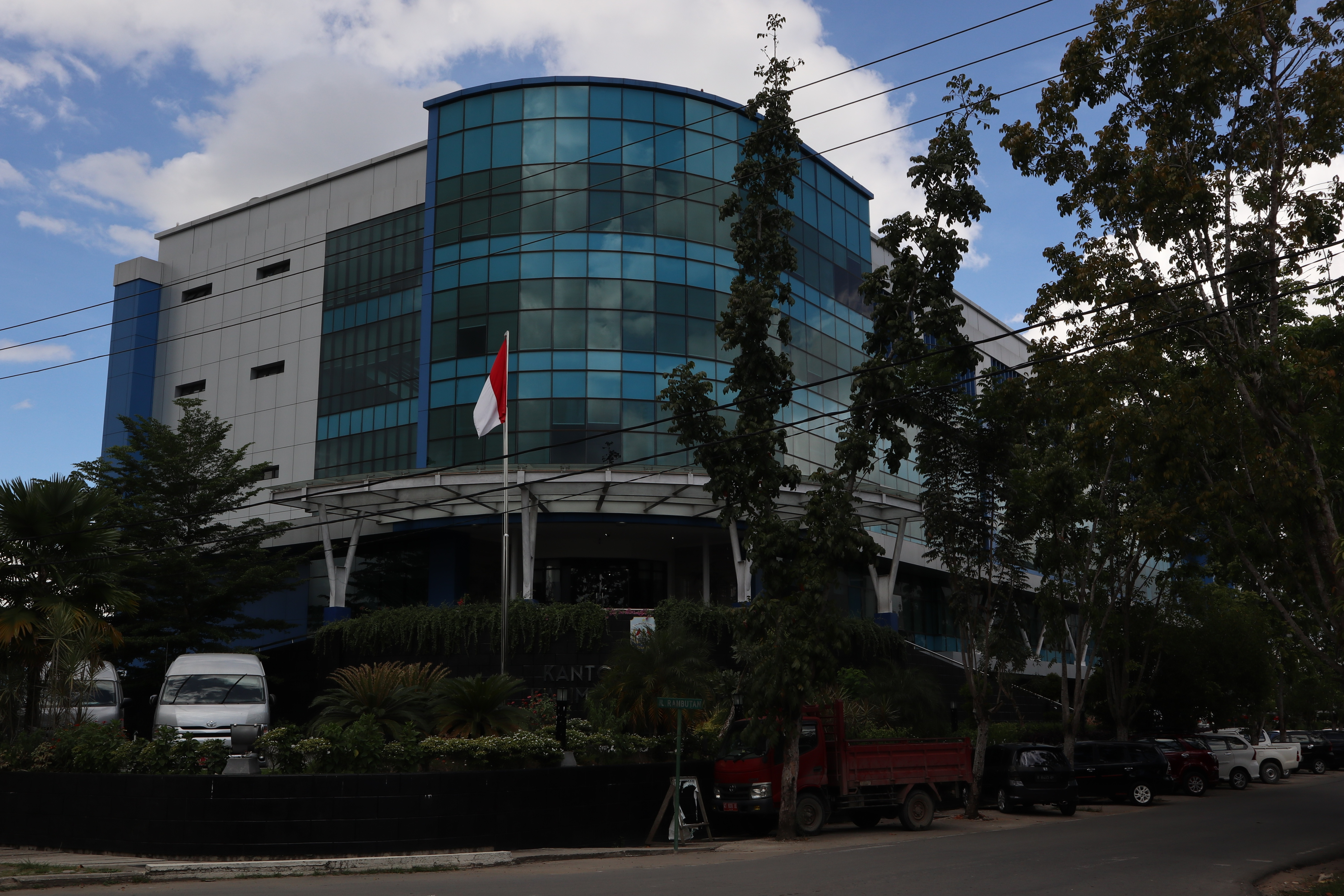 Kantor Gubernur Kalimantan Utara di kota Tanjung Selor.